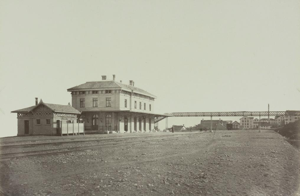 Station Thalwil (damals Thalweil)